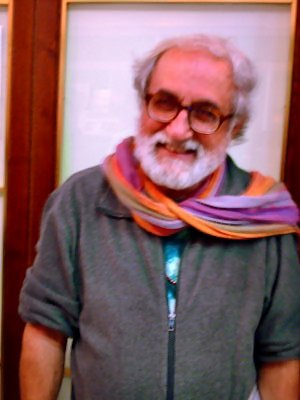 Padre Alex Zanotelli